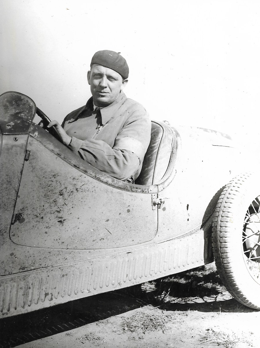 Jindřich Knapp, Walter Junior S závodní (1933)